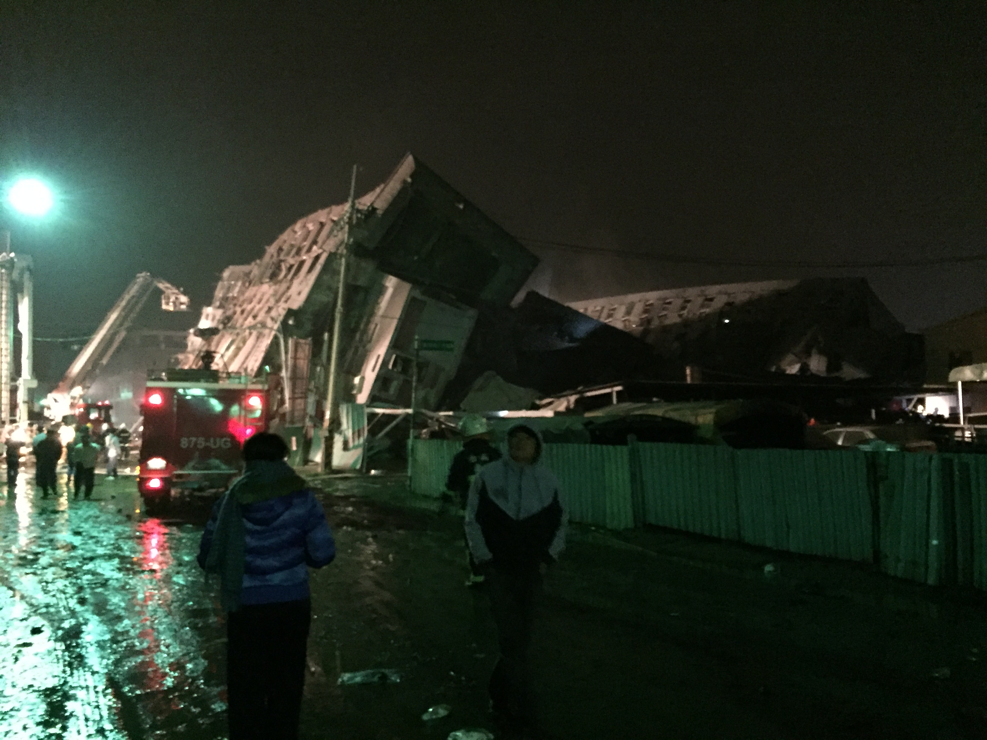 維冠金龍(Weiguan Jinlong) buidling, Tainan, Taiwan